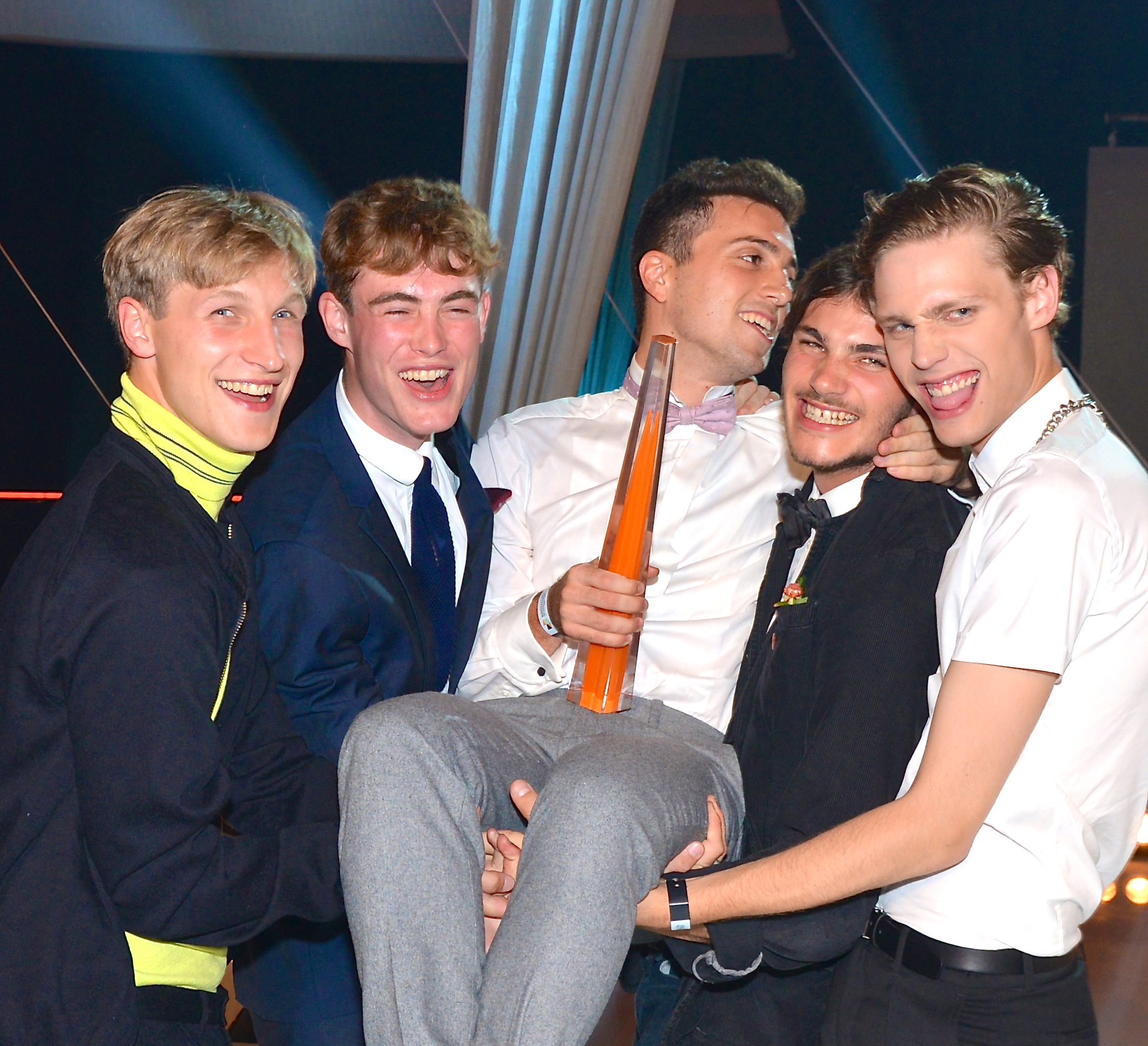 SVT-produktionen Modellpojkar blev vinnare av Kristallen 2013 på Kristallengalan den 30 augusti.